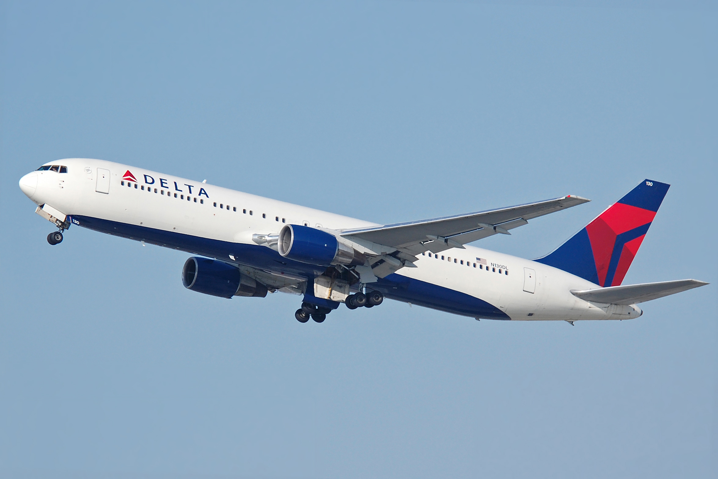 A Delta Air Lines 767-300